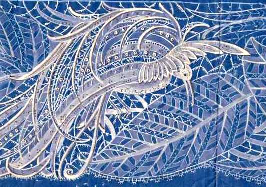 MAHB - Bayeux : Maison dentellière Lefébure, dessin préparatoire (vers 1900)